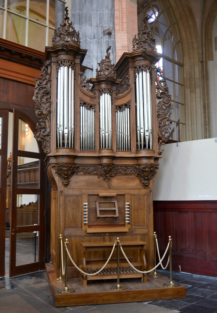 Grins, Martinytsjerke, koeroargel Jean-Baptiste Le Picard (1742)